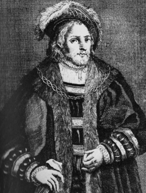 Heinrich XVI. der Reiche von Bayern (1386—1450), seit 1393 Herzog von Bayern-Landshut